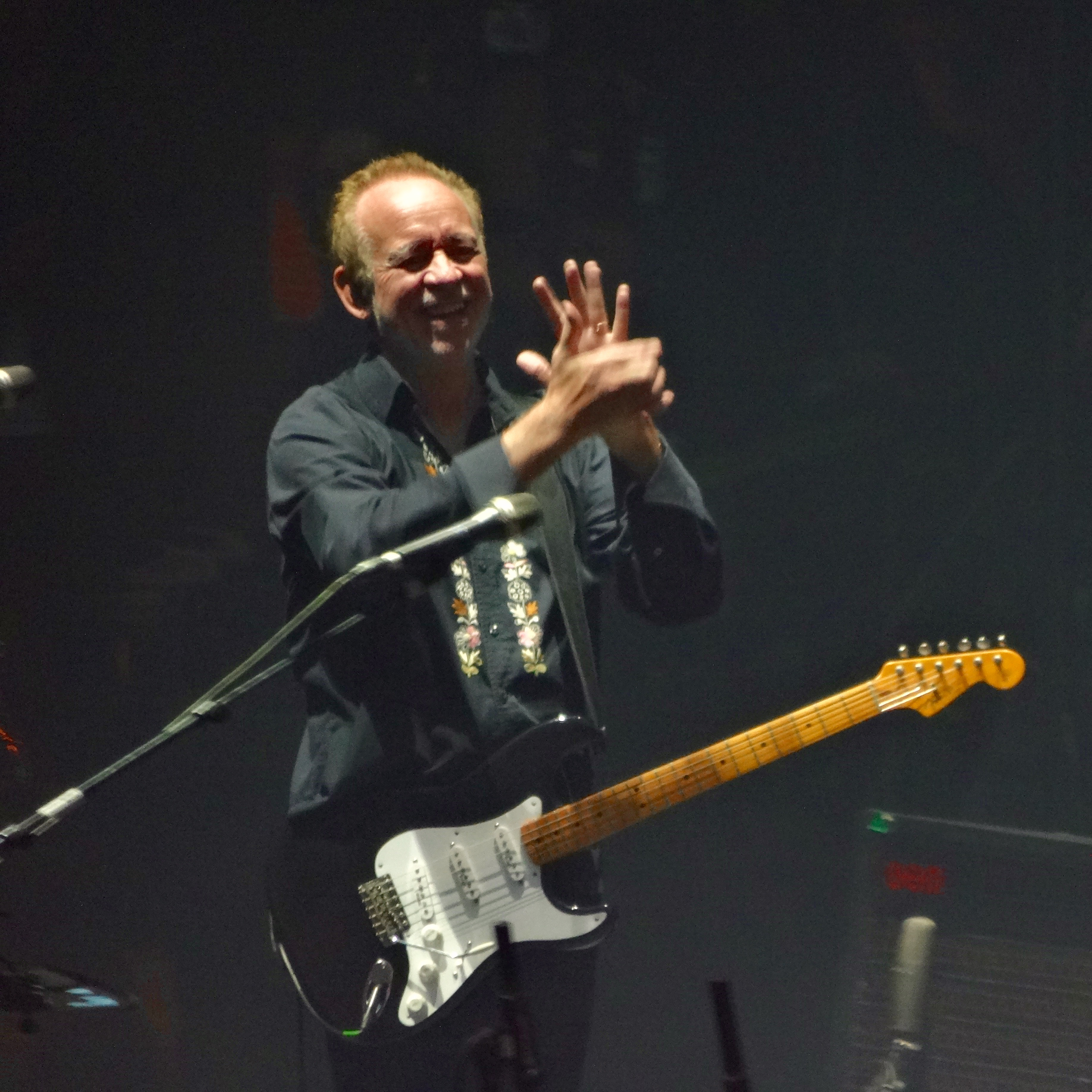 Phil Manzanaera